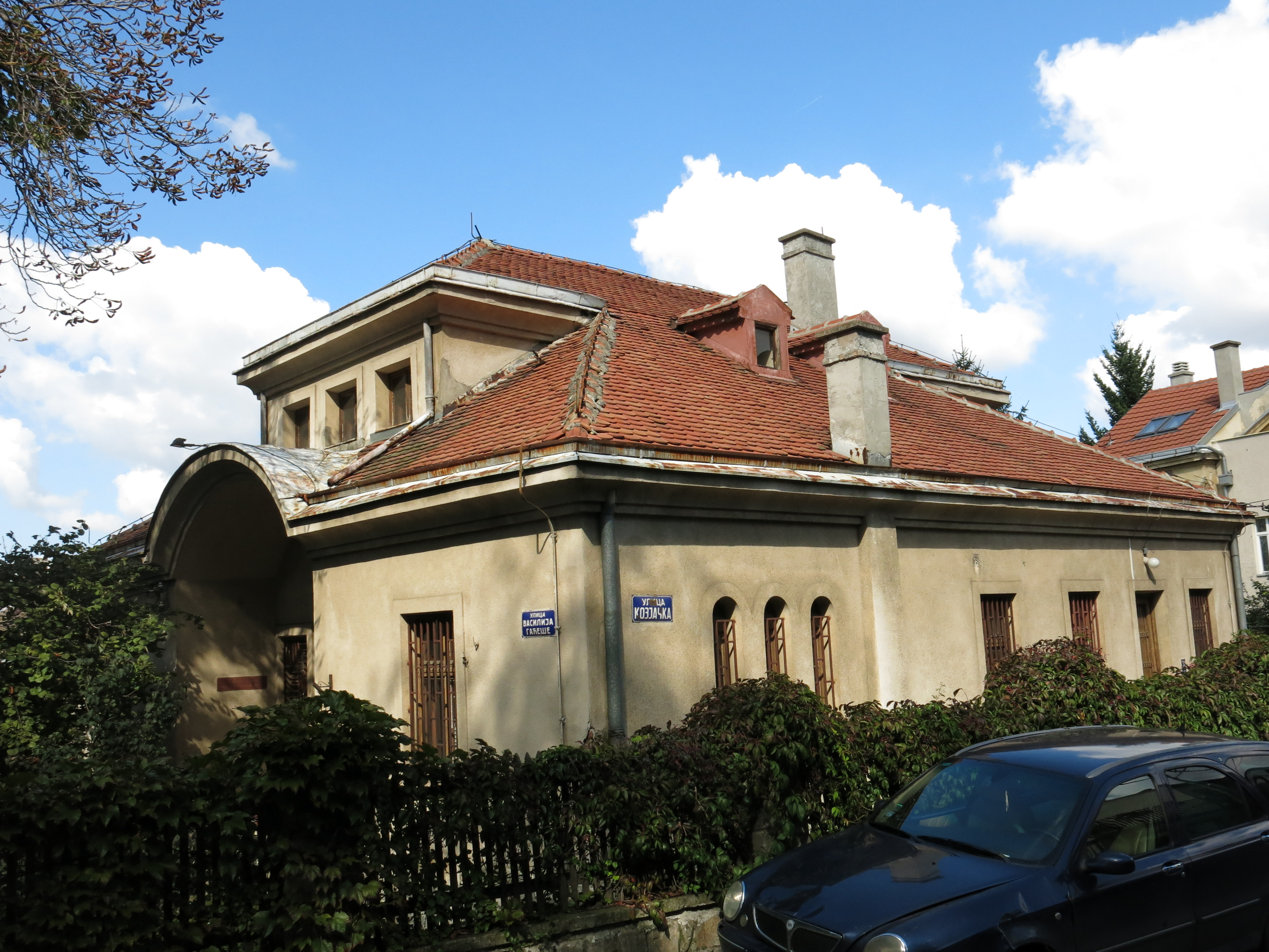 Музеј Томе Росандића